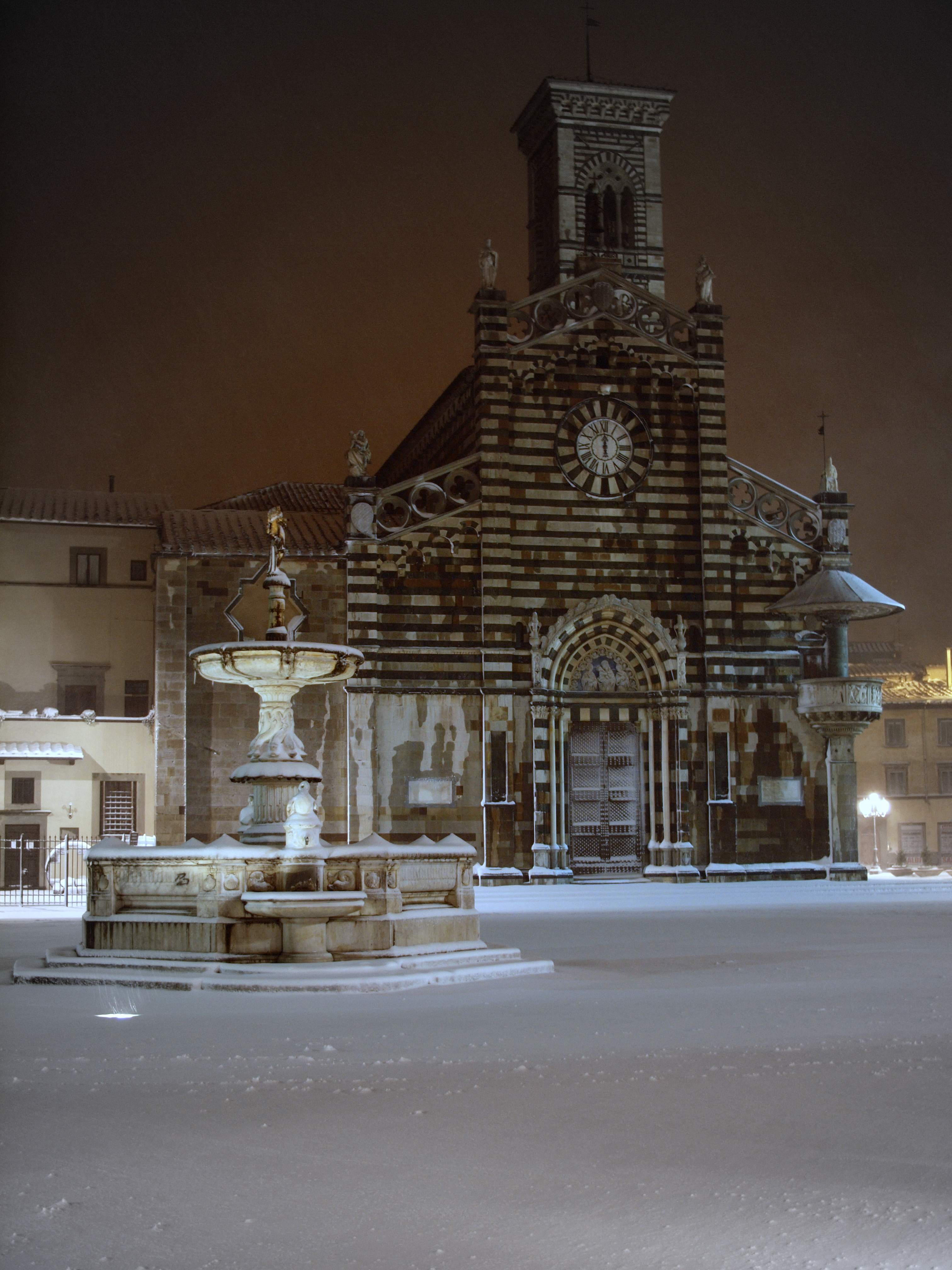 Piazza Duomo This is a photo of a monument which is part of cultural heritage of Italy.